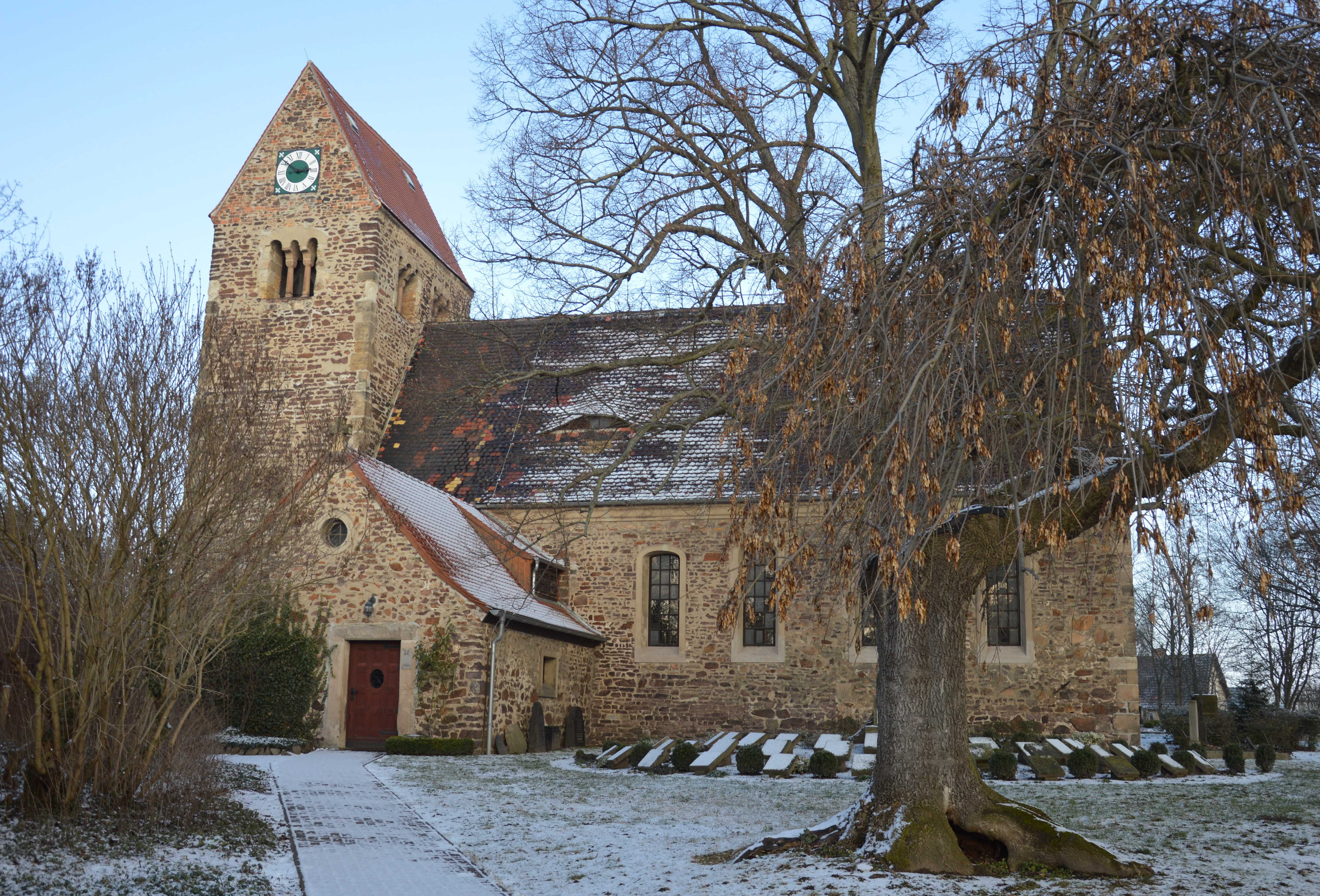 Kirche Oppin